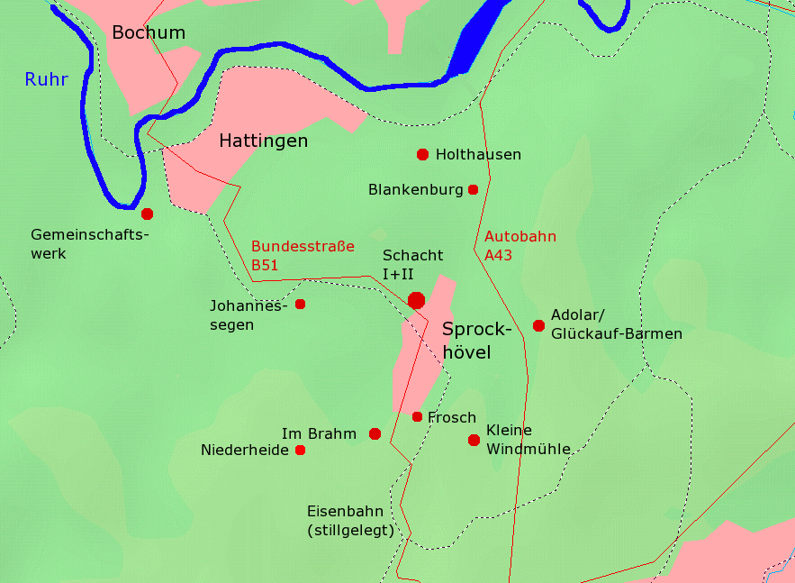 Karte der Außenanlagen der Zeche Alte Haase im Bereich Sprockhövel, Deutschland